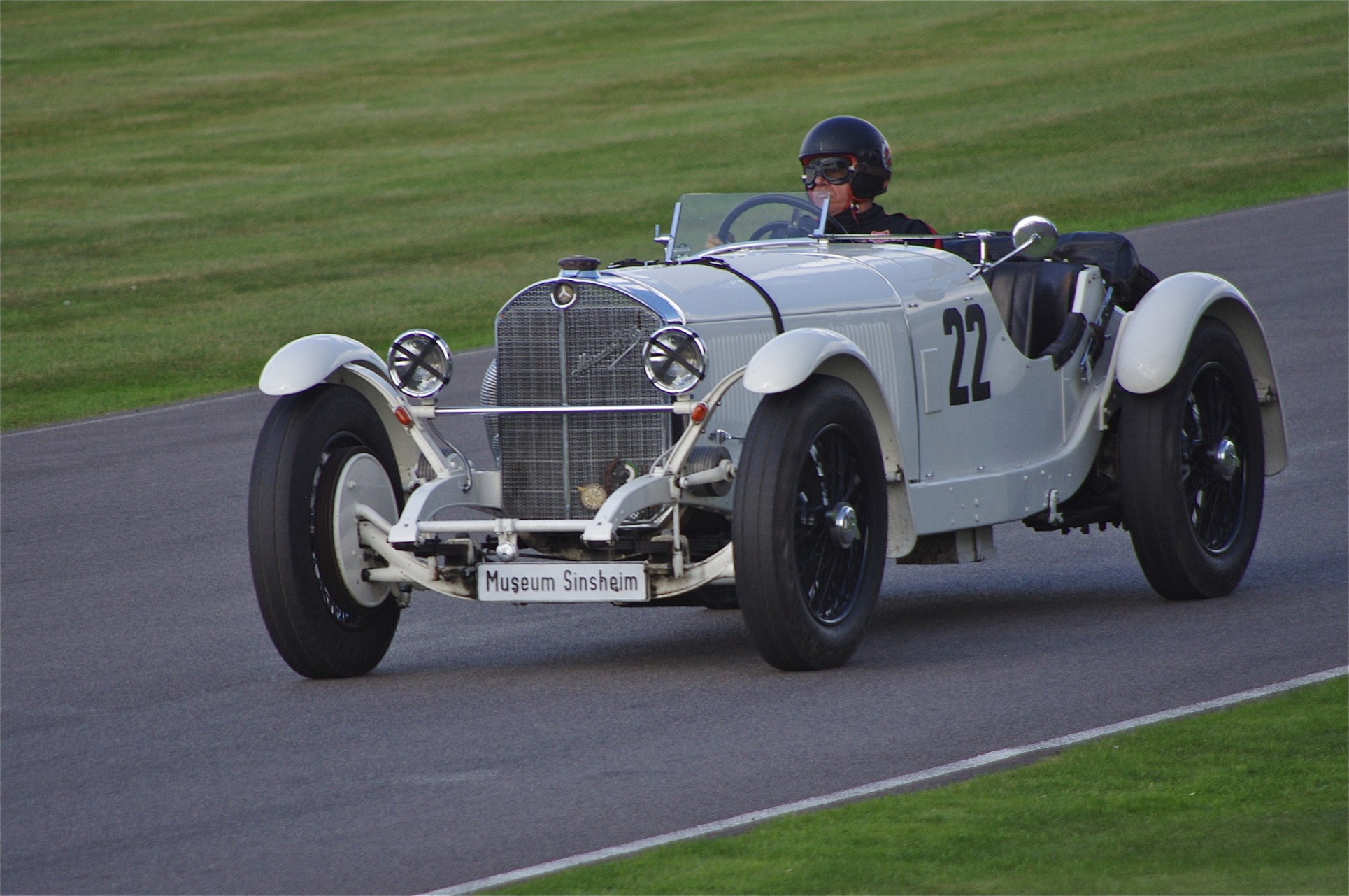 Goodwood Revival 2012